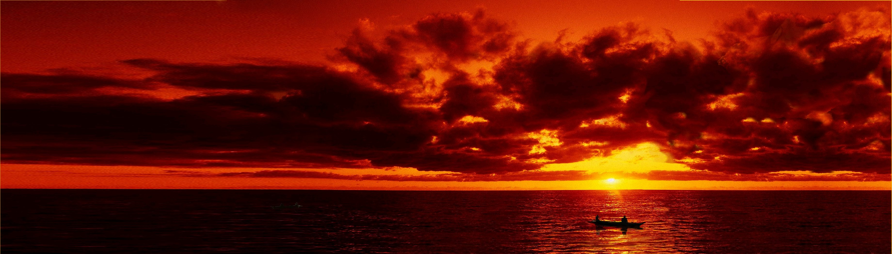 Lake Victoria Sunset, 1973Lake Victoria 1973 Sunset2